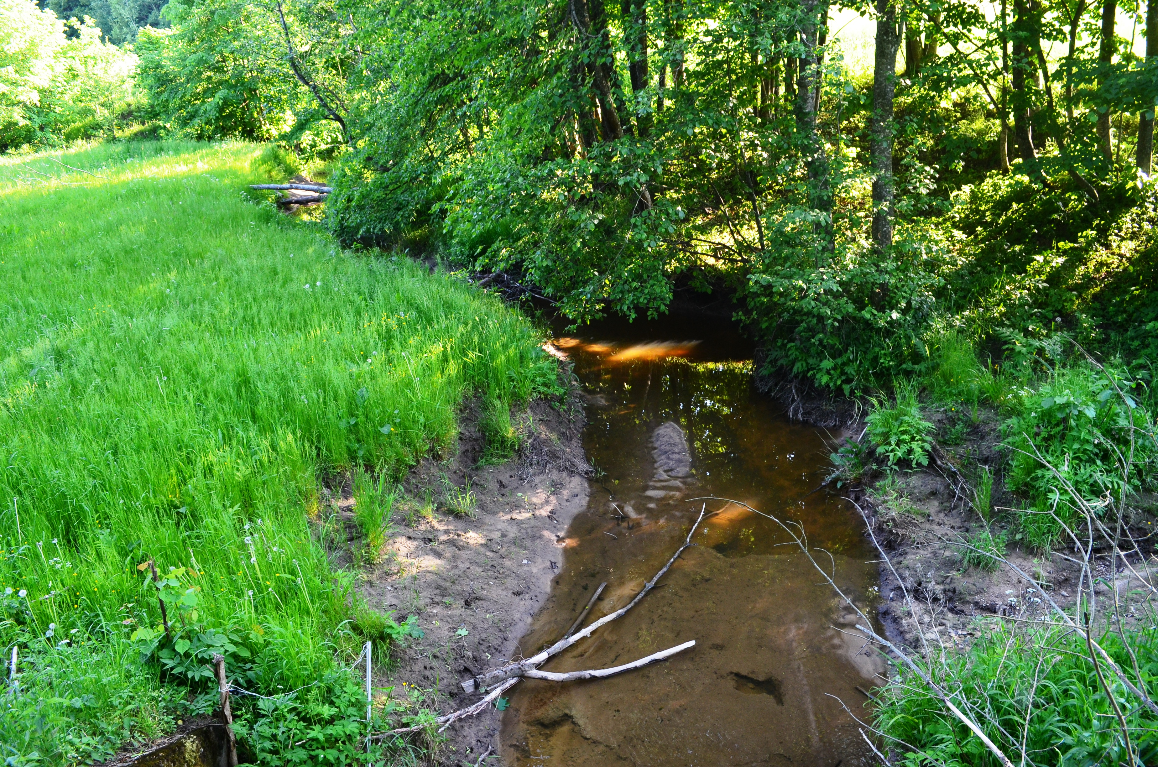 Juodupis prie Selveravos, Kauno raj.